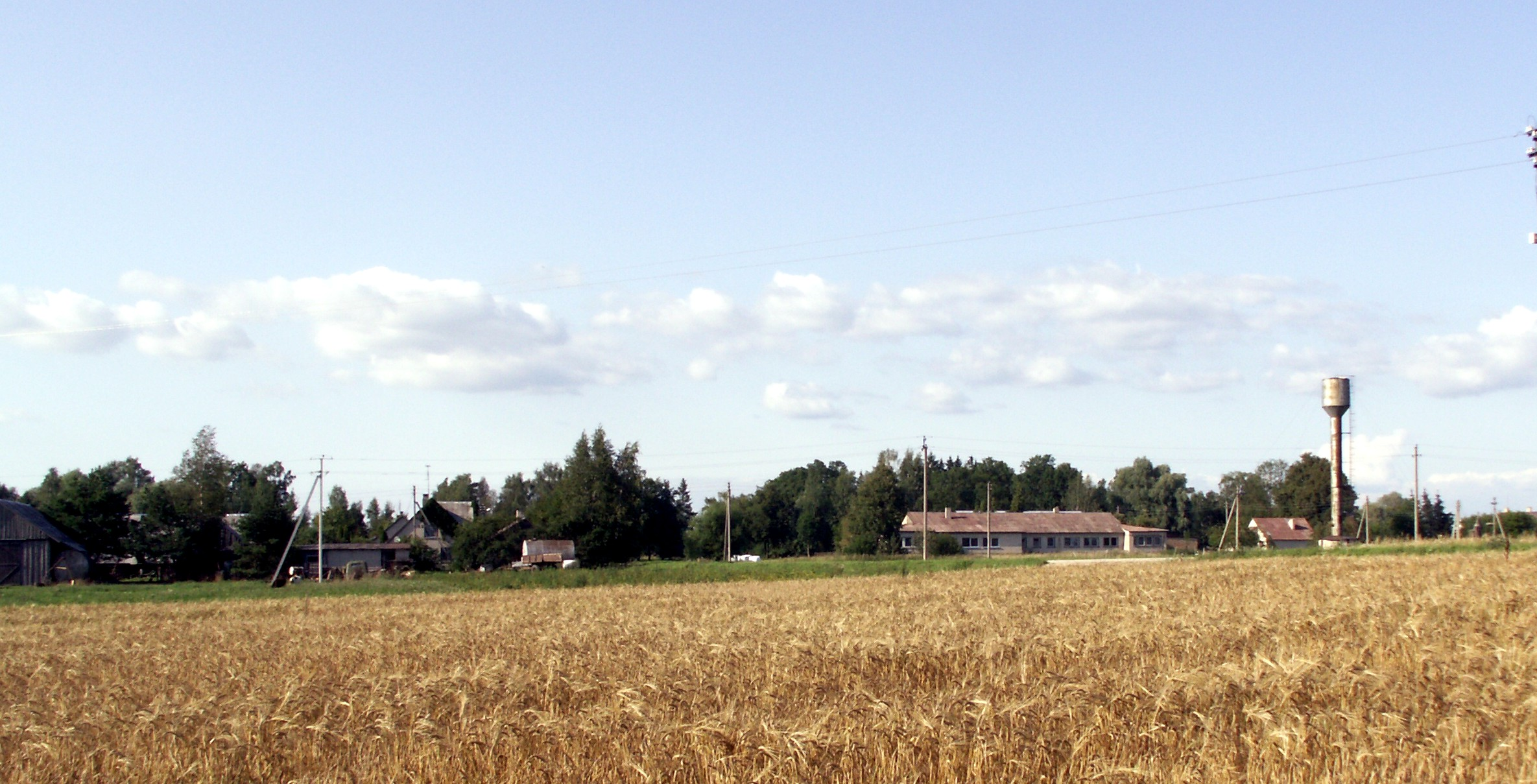 Anglininkai – gyvenvietė Biržų rajone